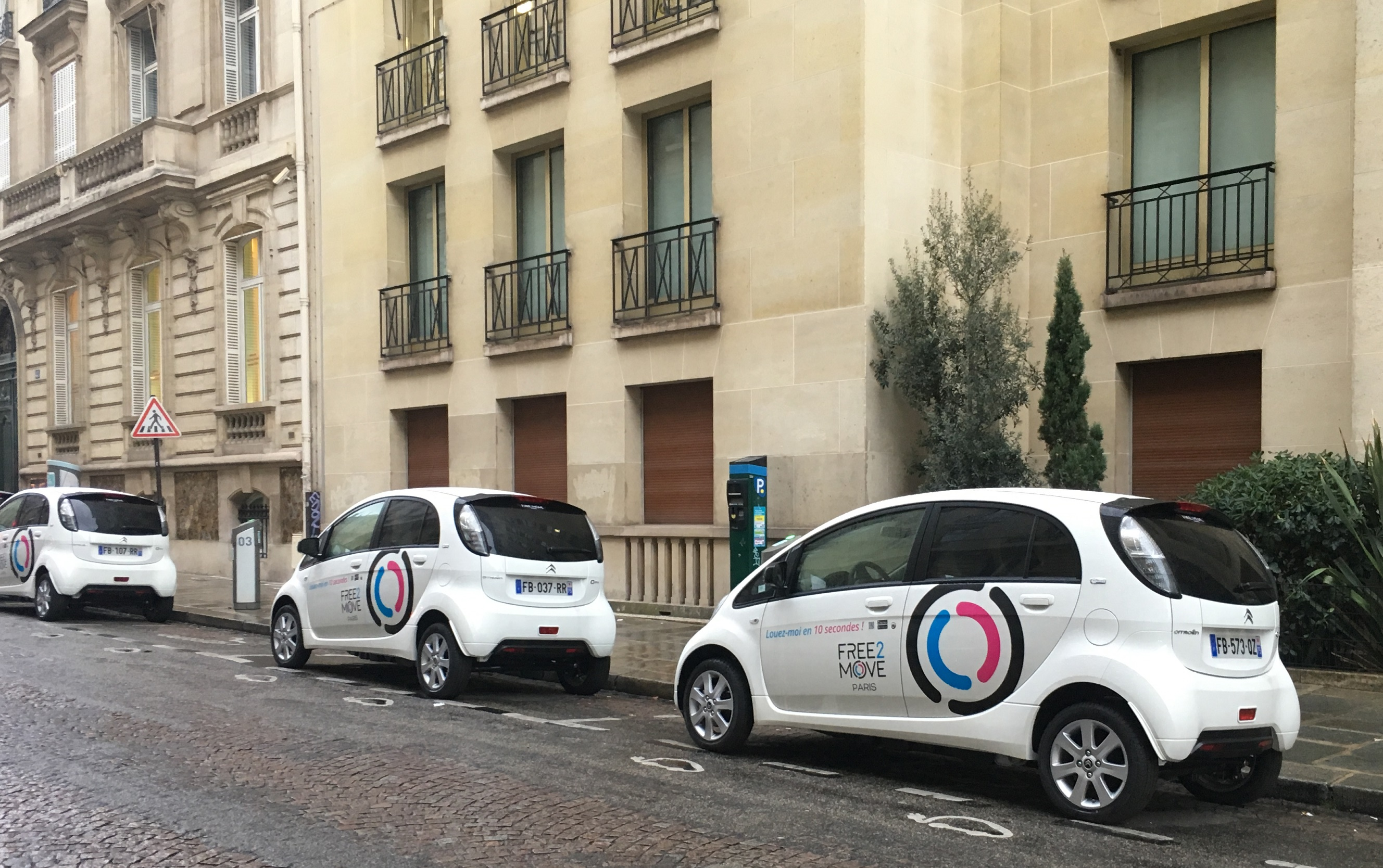 Trois véhicules Citroen C-zero partagés Free2Move Paris